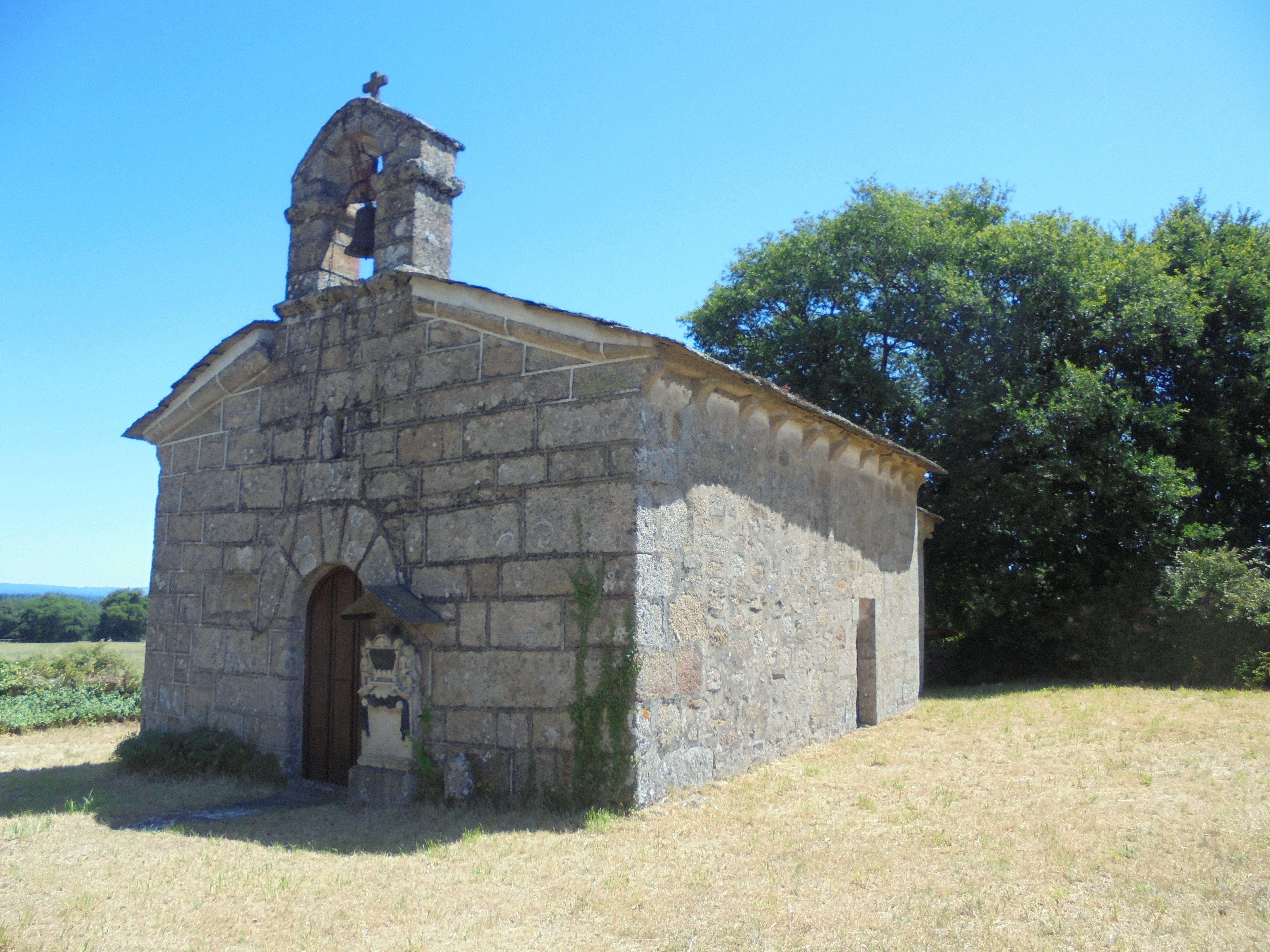 Igrexa parroquial de Camposo ( O Corgo)